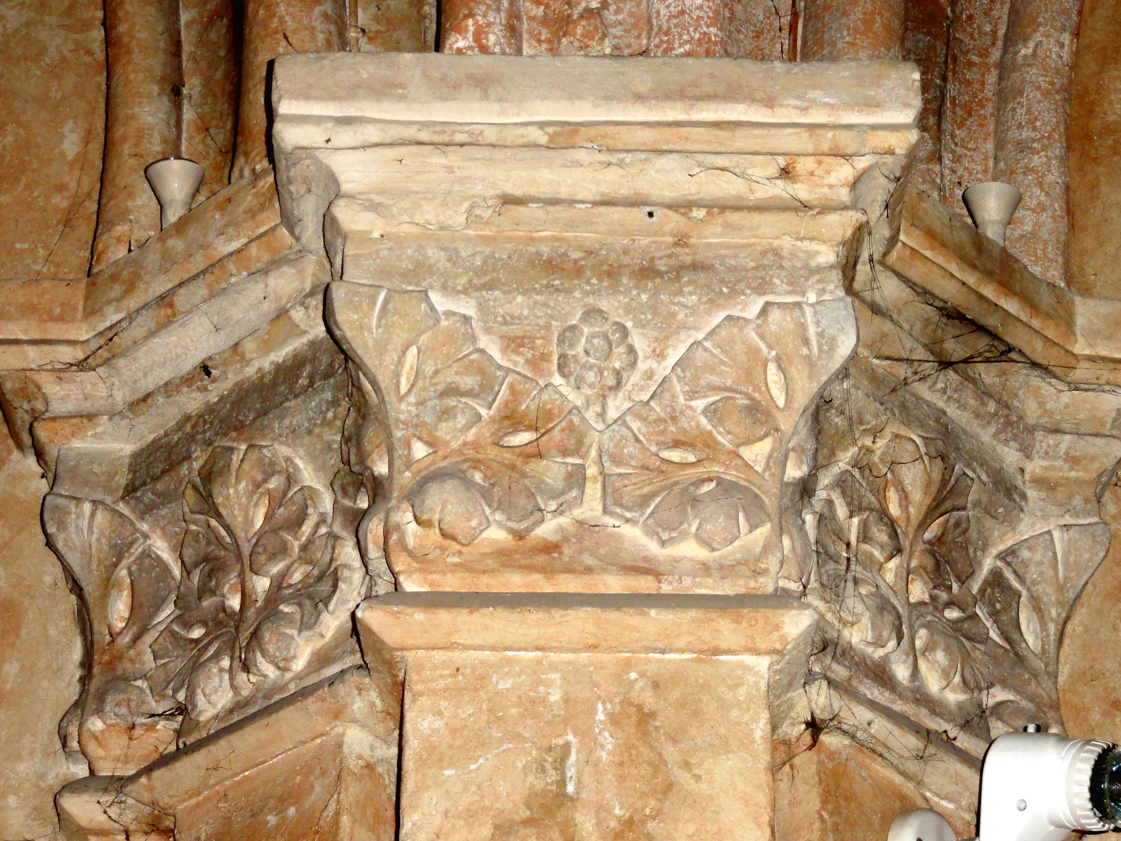 Chapiteau(x) de l'église ou cul-de-lampe - voir titre.